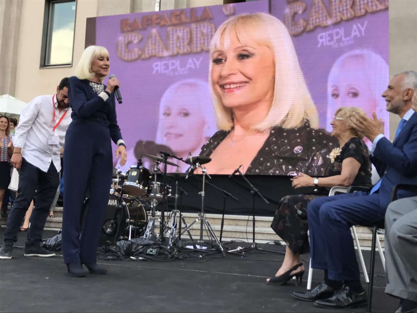 Dos países unidos por muchos rasgos comunes, Italia y España. Por primera vez, la Fiesta de la República, día nacional en Italia, se abre a todos los madrileños con una celebración que ha arrancado la tarde del 2 de junio y concluirá el domingo 4 de junio. Manuela Carmena, alcaldesa de Madrid, y Stefano Sannino, embajador del país casi vecino, acudieron este viernes al patio central del Conde Duque, reconvertido en una auténtica piazza italiana, para adentrarse en la cultura, la música, la gastronomía y el diseño, uno de los puntos fuertes italianos y que sirve de hilo conductor al programa del fin de semana, y también de nexo entre los diseñadores italianos y madrileños.